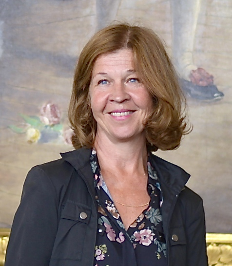 Ingela Olsson under Dramatens höstsamling 2014.